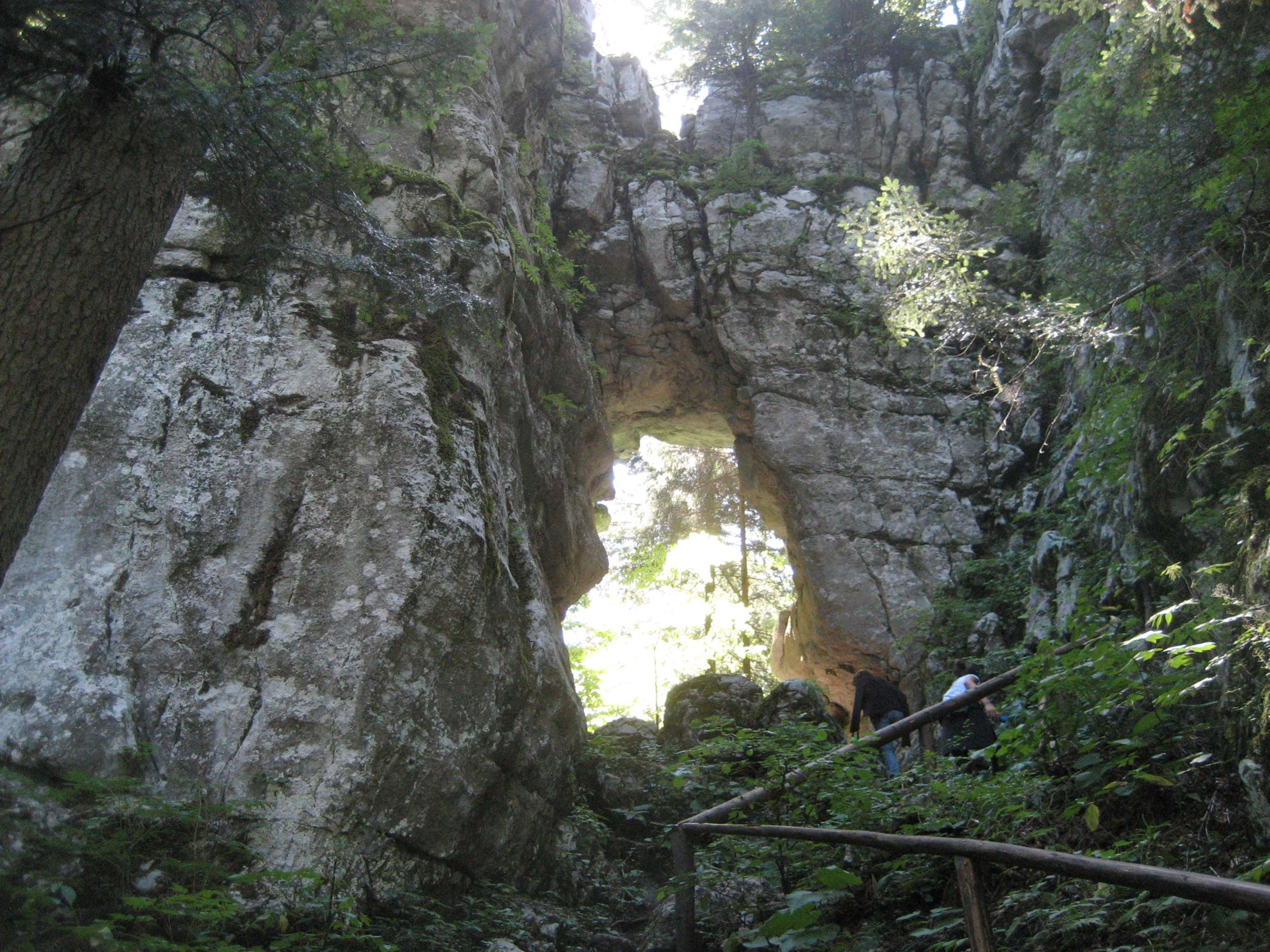 Paklena vrata